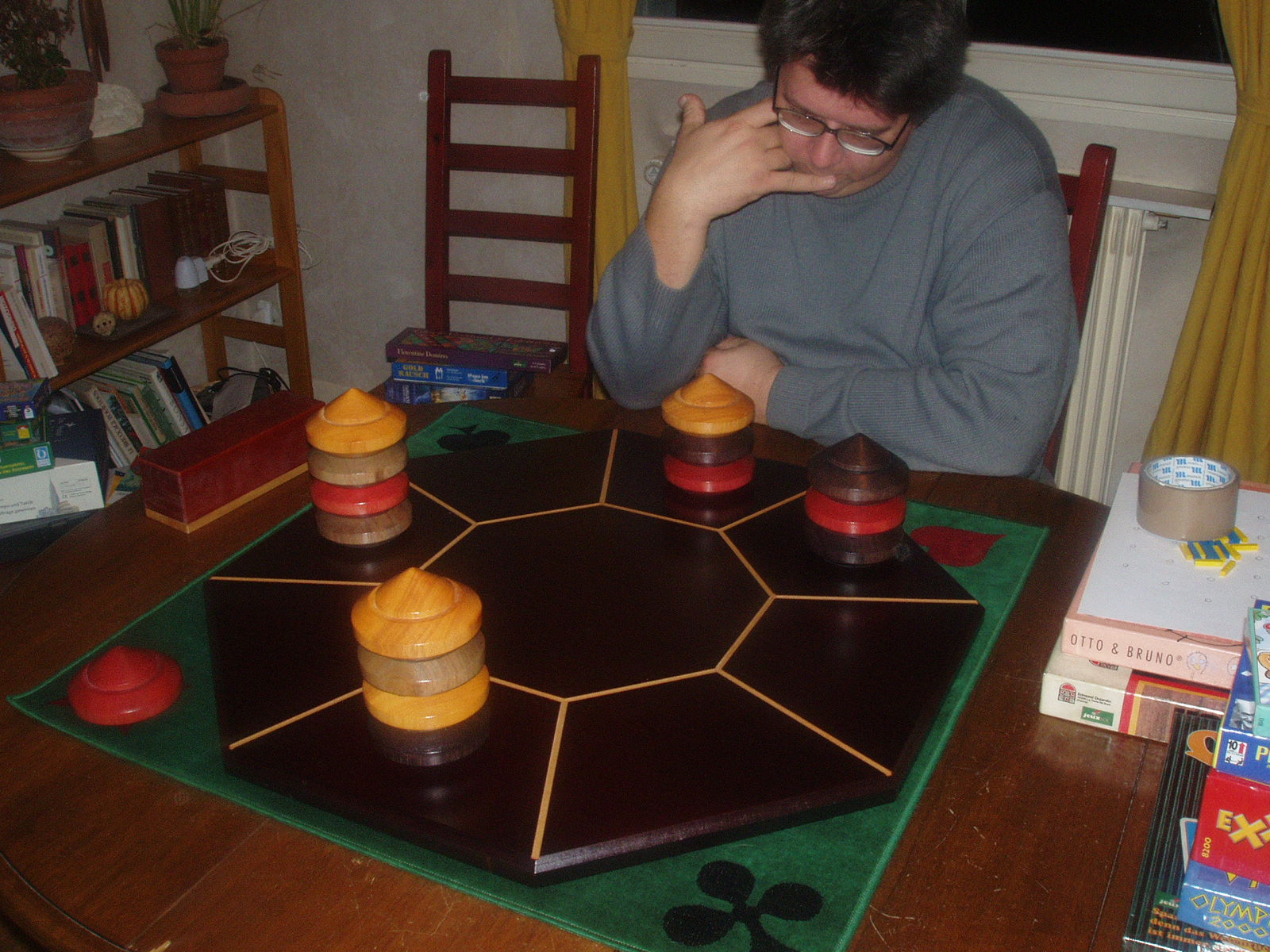 Jeu Diam